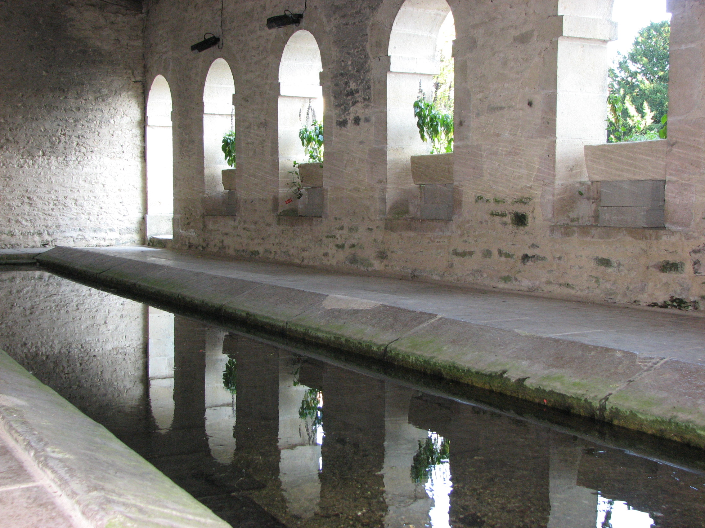 Argenteuil-sur-Armançon. Le lavoir, près du château.